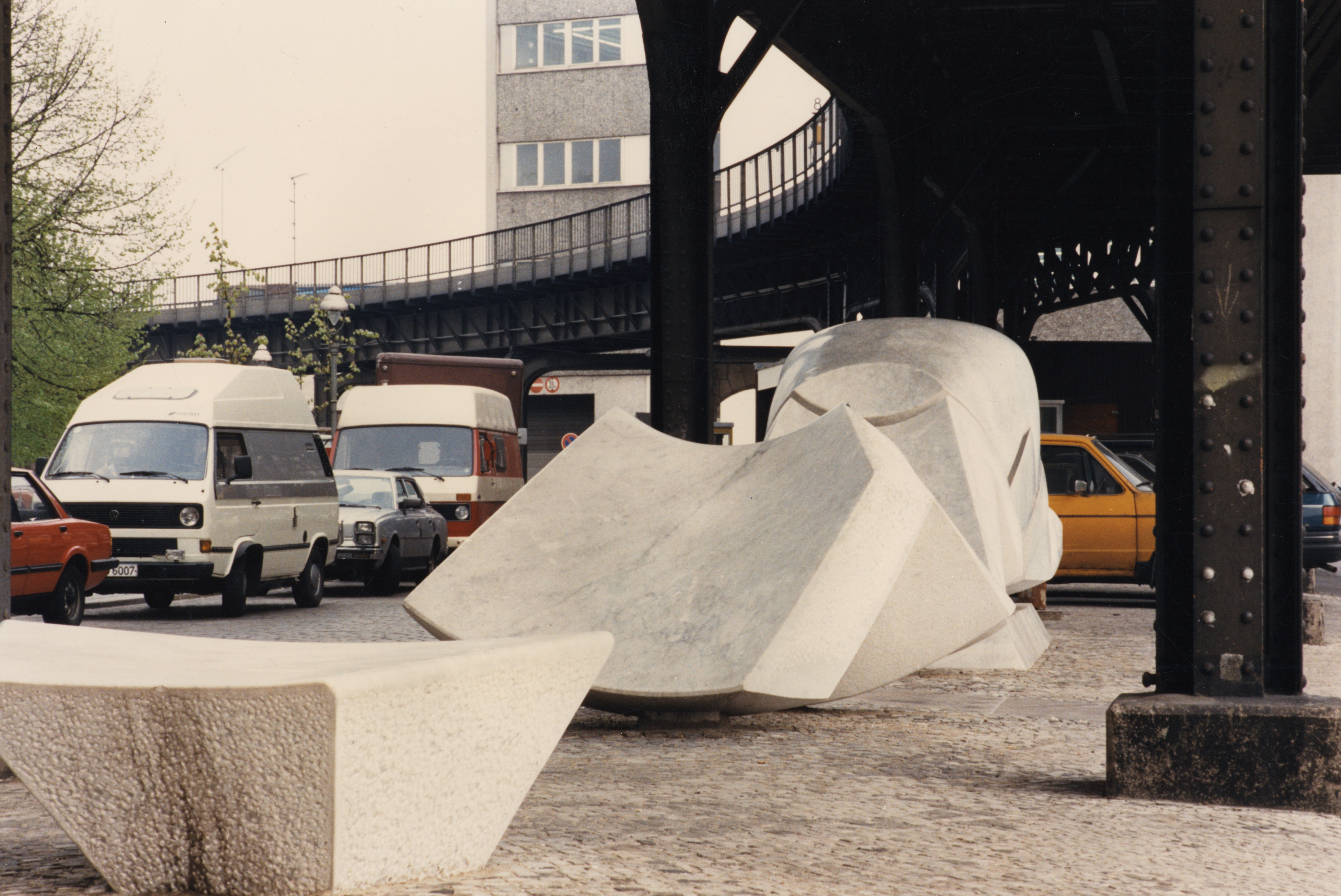 Louis Niebuhr, Puppenruhe, 1986/87, Marmor, Berlin